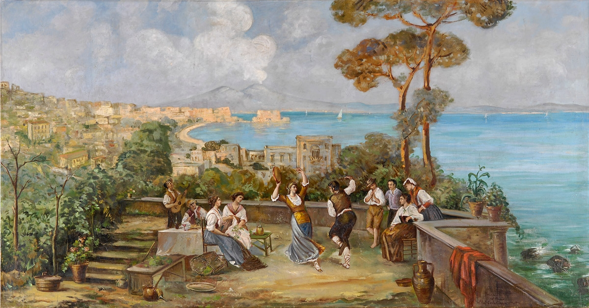 Feiernde Neapolitaner. Öl auf Leinwand, 108 × 210 cm